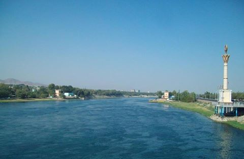 Тоҷикӣ: Сирдарё назди ш. Хуҷанд, вилояти Суғд